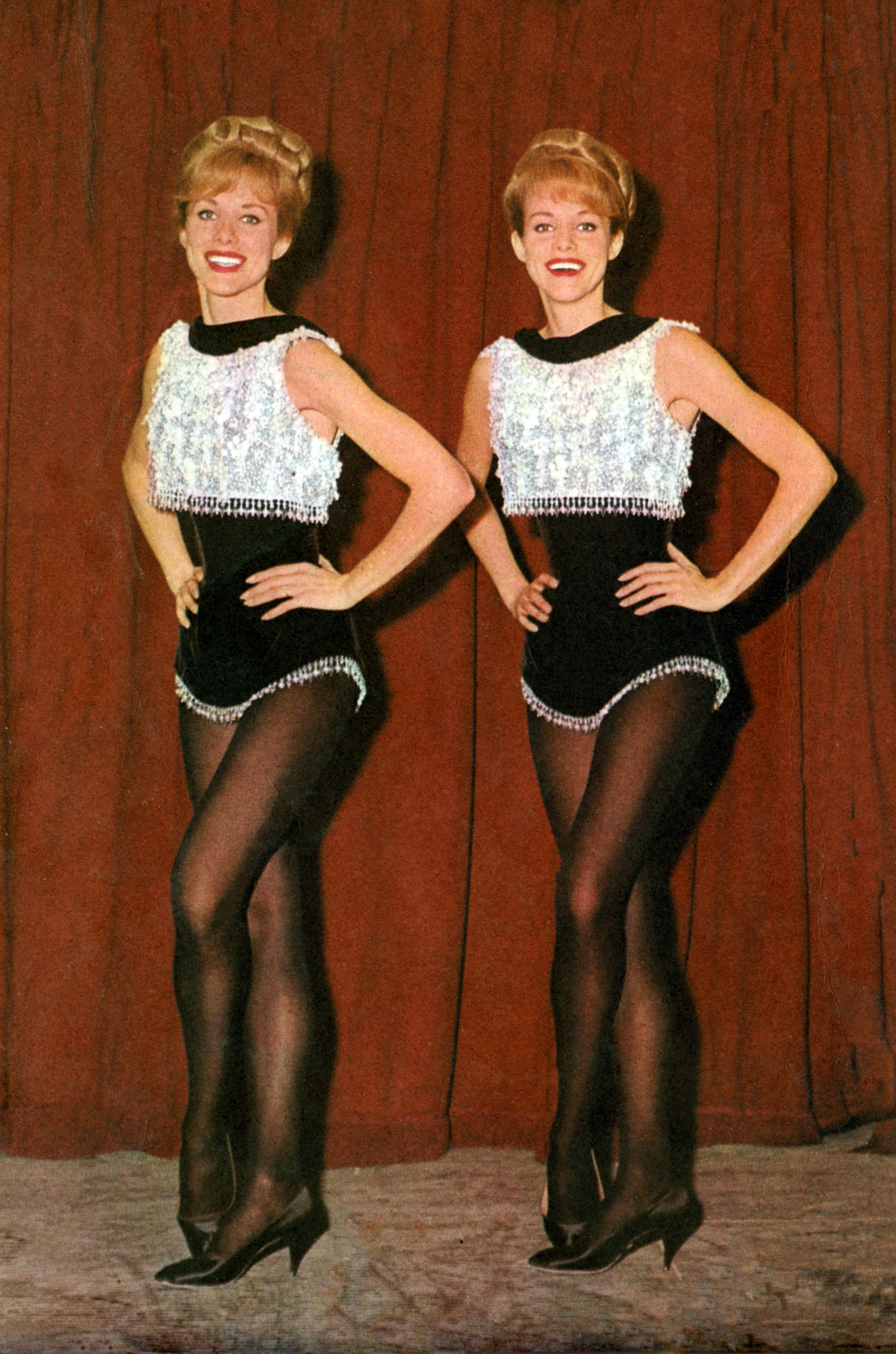 photo from the magazine Sorrisi e canzoni (1965)